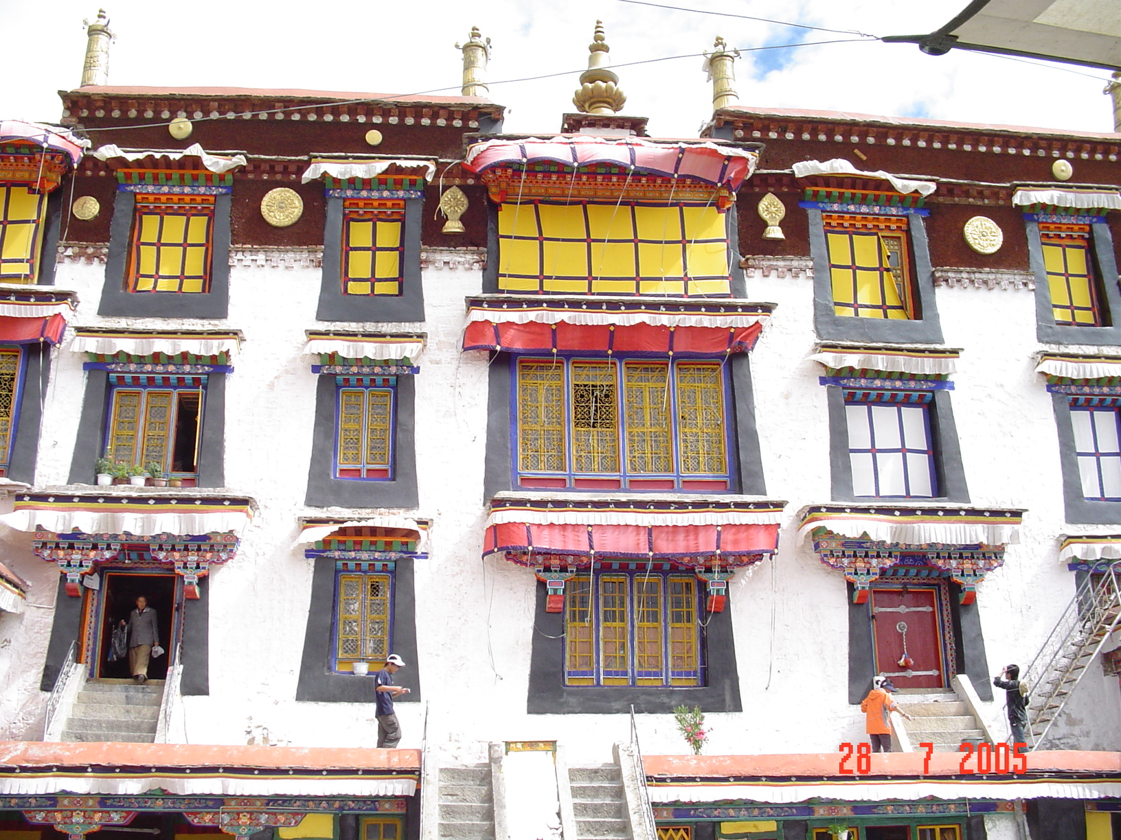 Монастырь Дрепунг около Лхаса в Тибете